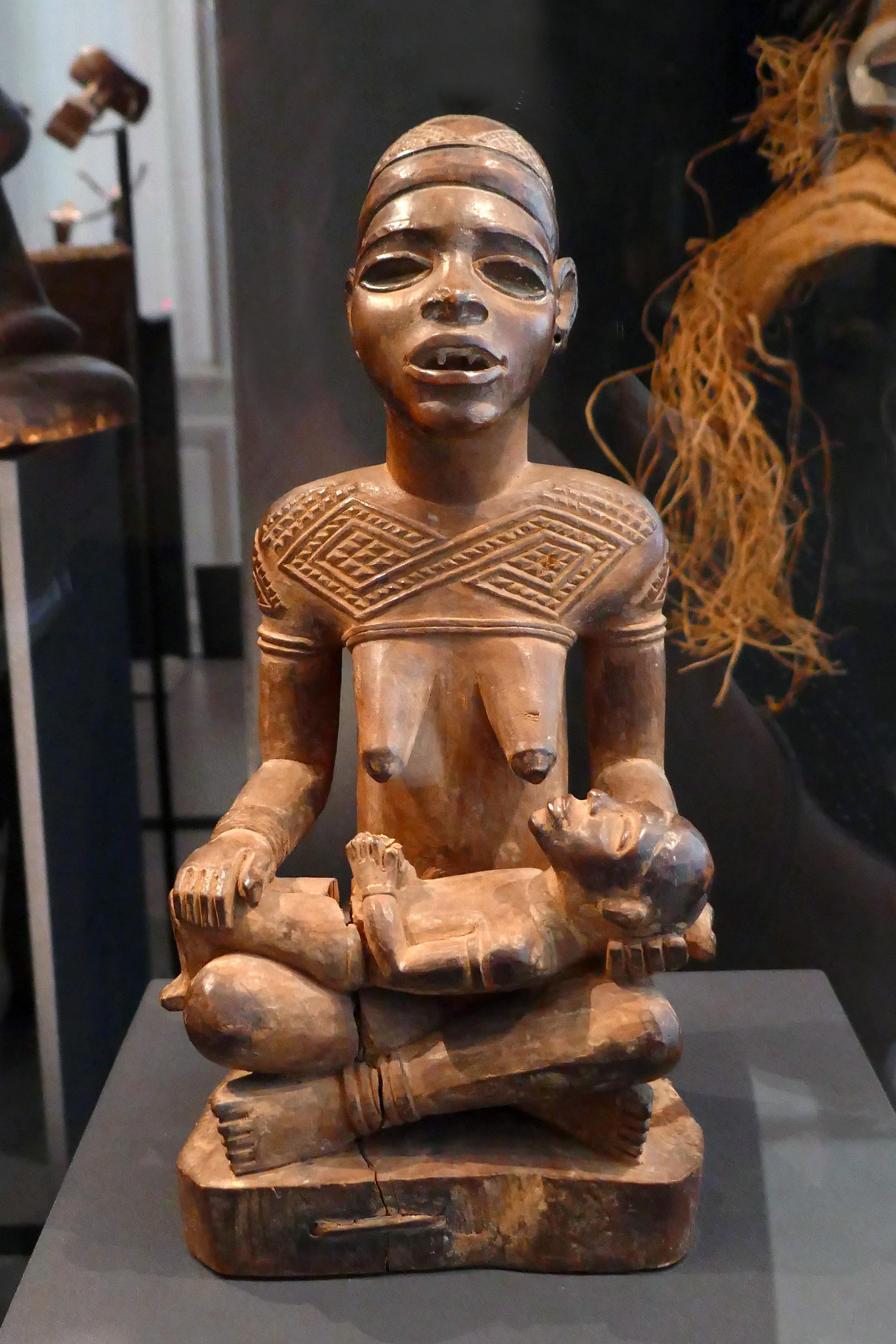 Maternité Phemba Artiste : maître de Kasadi, 4e quart du 19e siècle Population : Yombe, Angola/RDC Bois (Nauclea latifolia) ?? Collecté par le père Léo Bittremieux (années 1930 ?) Enregistré en 1937 Musée royal de l'Afrique centrale (Tervuren) N° EO.0.0.37964